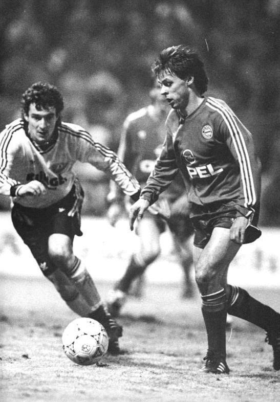 ADN-Wolfgang Kluge-26.11.90-Dresden: Fußball-Deutschland-Cup - 1. FC Dynamo Dresden - FC Bayern München 1:0 (0:0) Zweikampf zwischen Olaf Thon (r.,München) und Hans-Uwe Pilz, der nach seiner Rückkehr von Fortuna Köln sein zweites Spiel für die Dresdner bestritt.